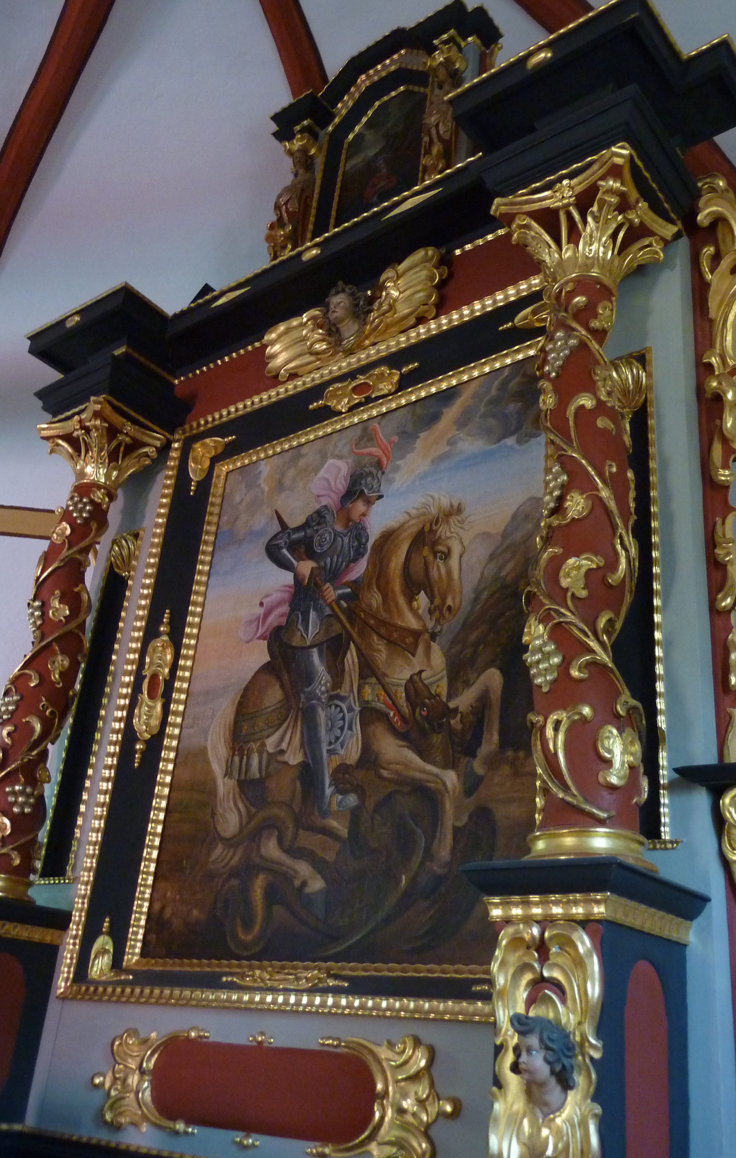 Filialkirche St. Georg im Wohnplatz Krebsbacher Hof von Meuspath